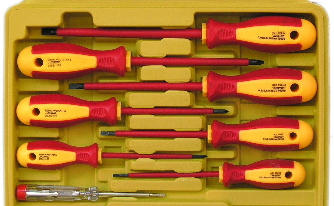 Набор диэлектрических отвёрток, включающий индикаторную отвёртку